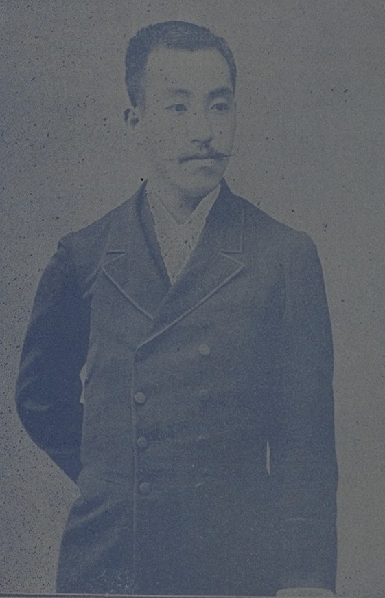 丹羽長保子爵（1869～1902）